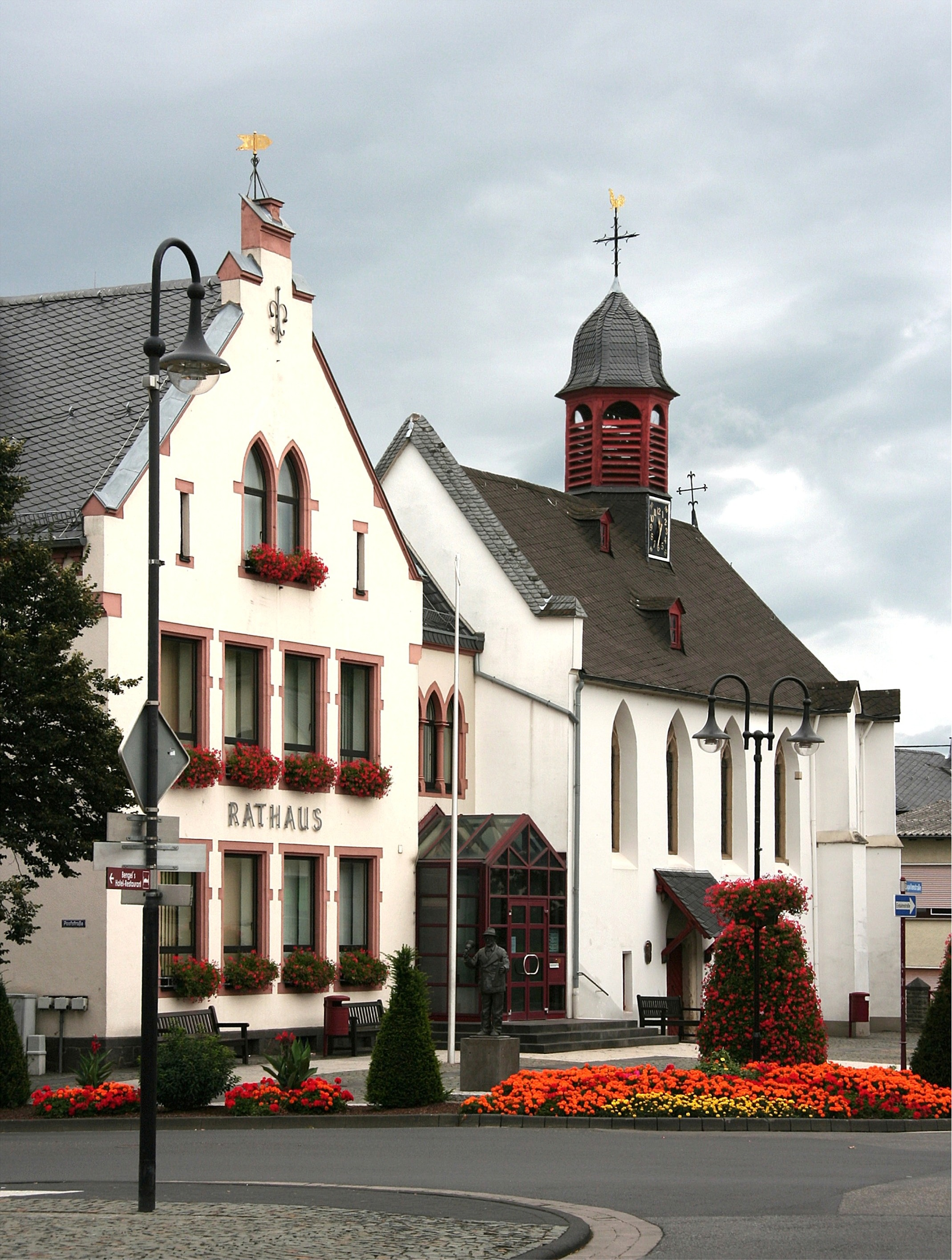 Rathaus und ehemalige Marienkapelle in Mülheim-Kärlich